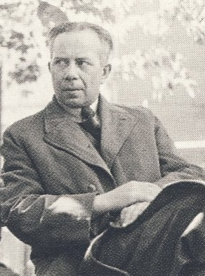 Harry Martinson (till vänster) och Ivar Lo-Johansson